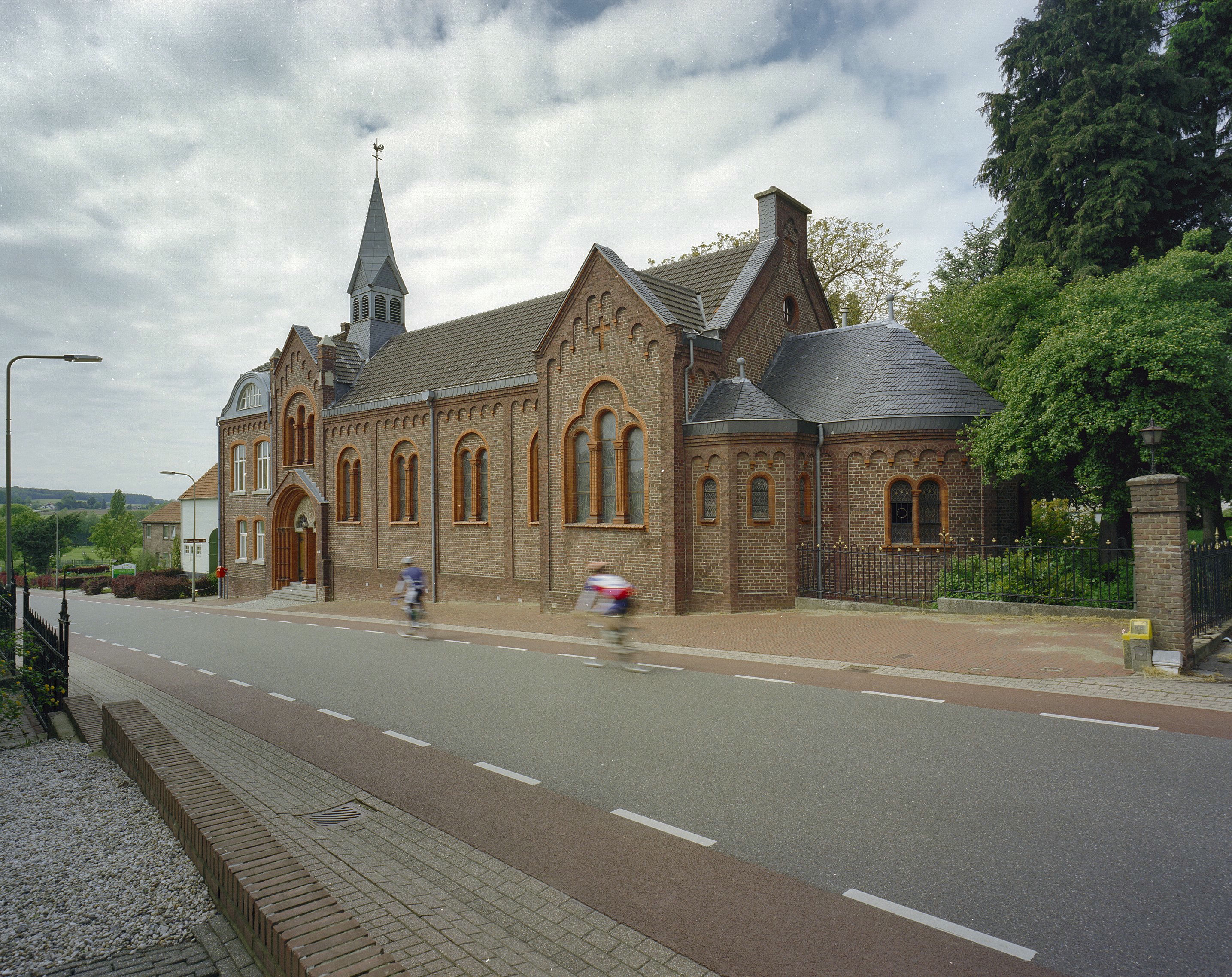 Kloosterkapel: Zicht op de gevel aan de straatzijde en de verlaagde absis en straalkapellen van de kloosterkapel (opmerking: Gefotografeerd voor Kastelen in Limburg (1000-1800), Burchten en landhuizen)